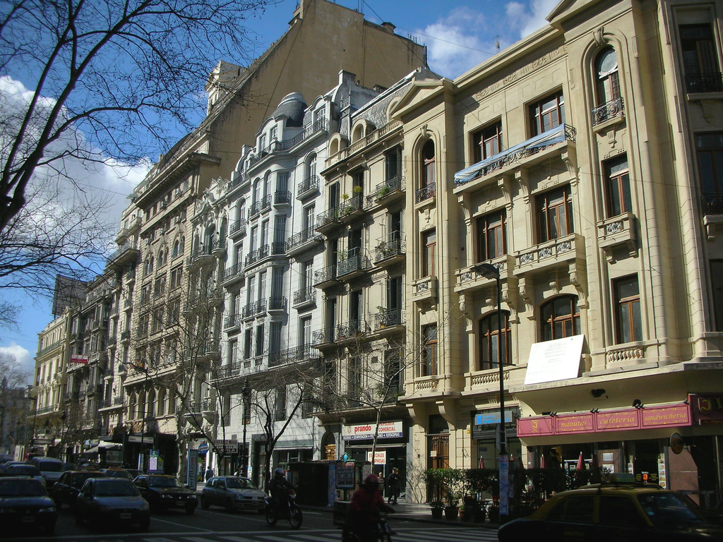 Avenida de Mayo, entre Lima y Salta, vereda sur (numeración par a la altura del 1100), Buenos Aires, Argentina